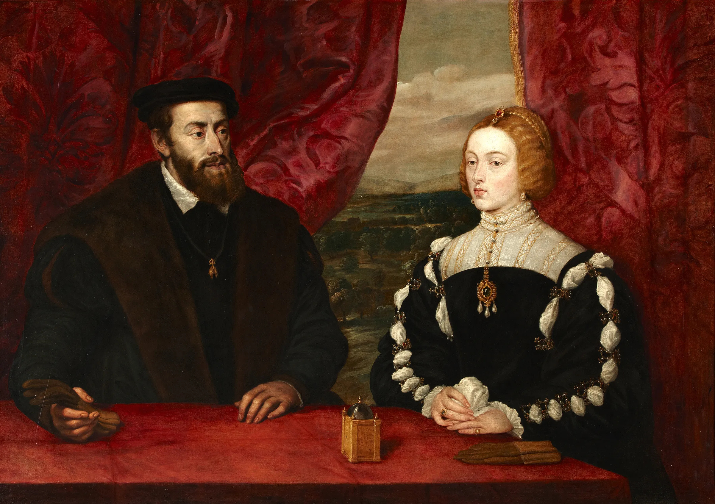 La obra representa a Carlos I de España y V del Sacro Imperio Romano Germánico y su esposa Isabel de Portugal, de medio cuerpo, sentados ante un paisaje.